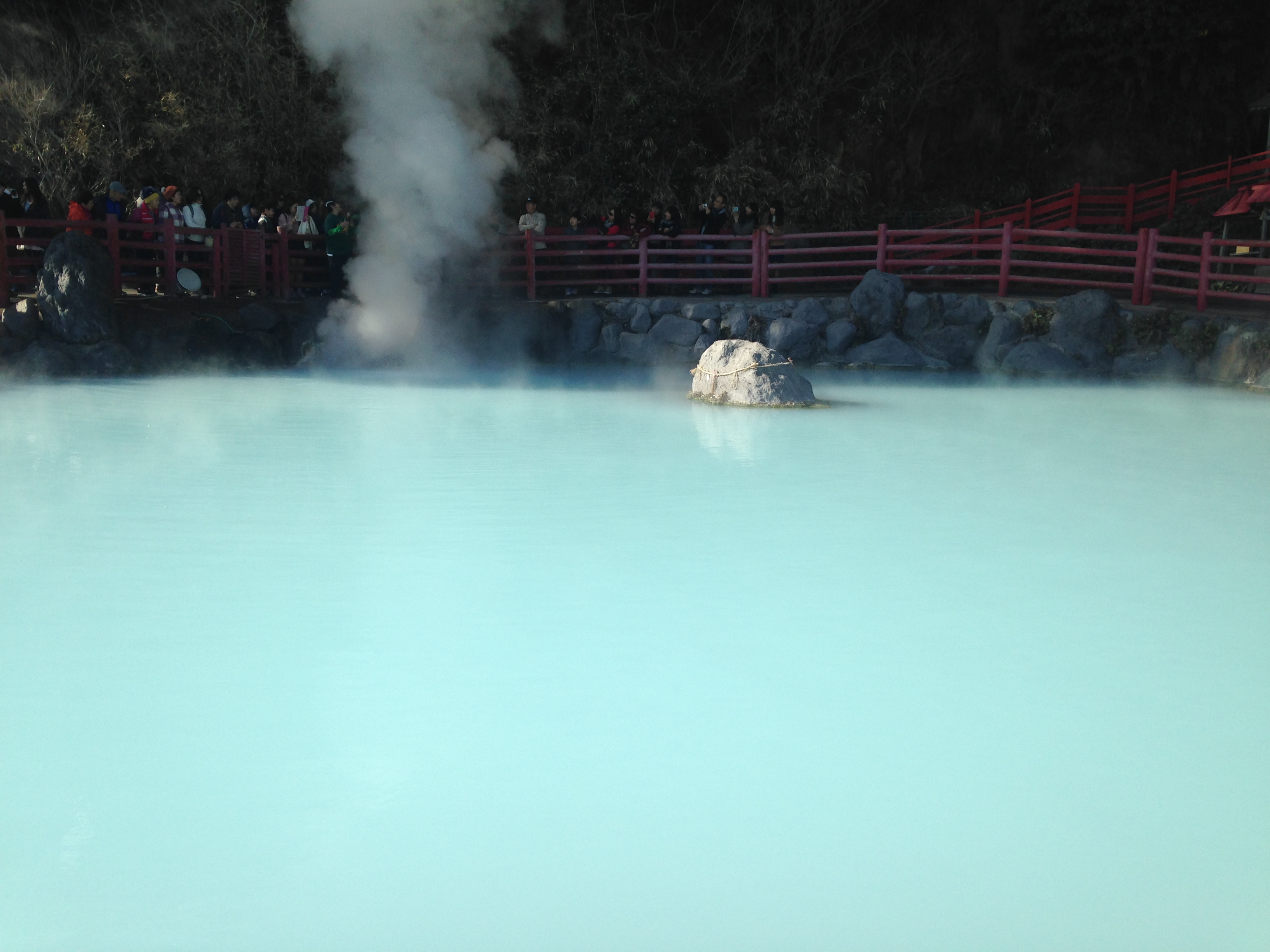 かまど地獄五丁目